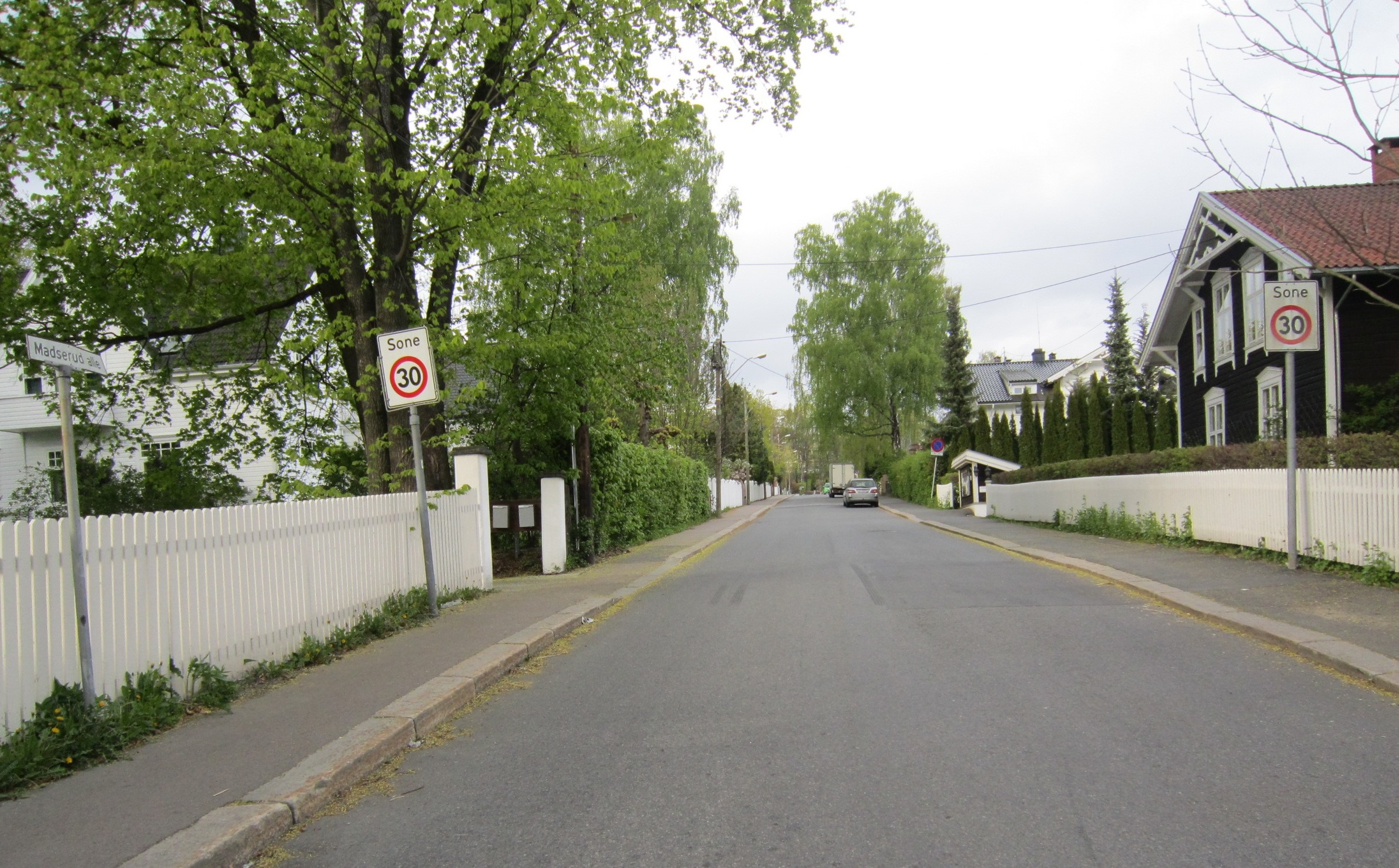 Madserud allé